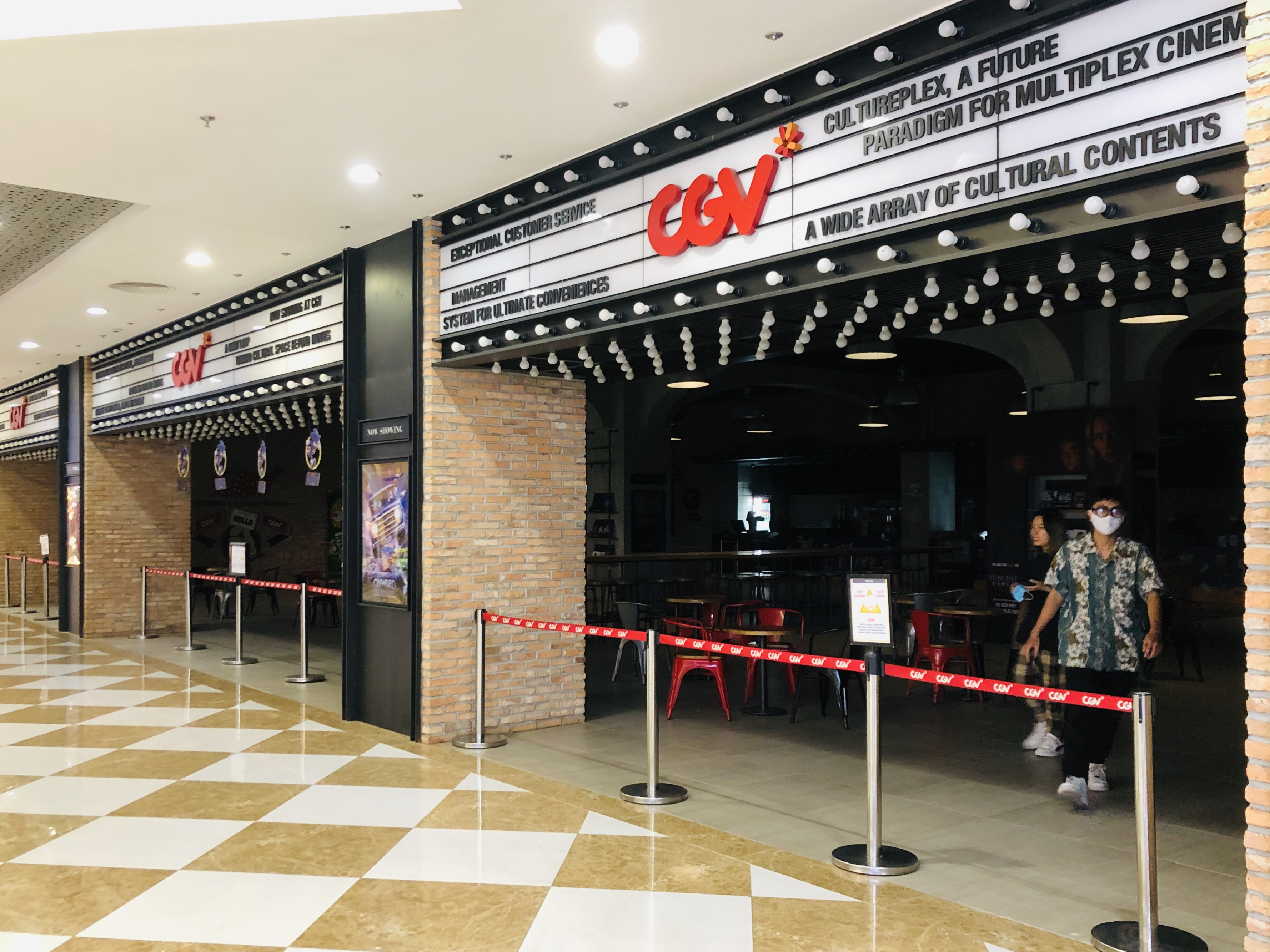 Cụm rạp CGV tại Tỉmes City tạm thời đóng cửa vì đại dịch COVID-19